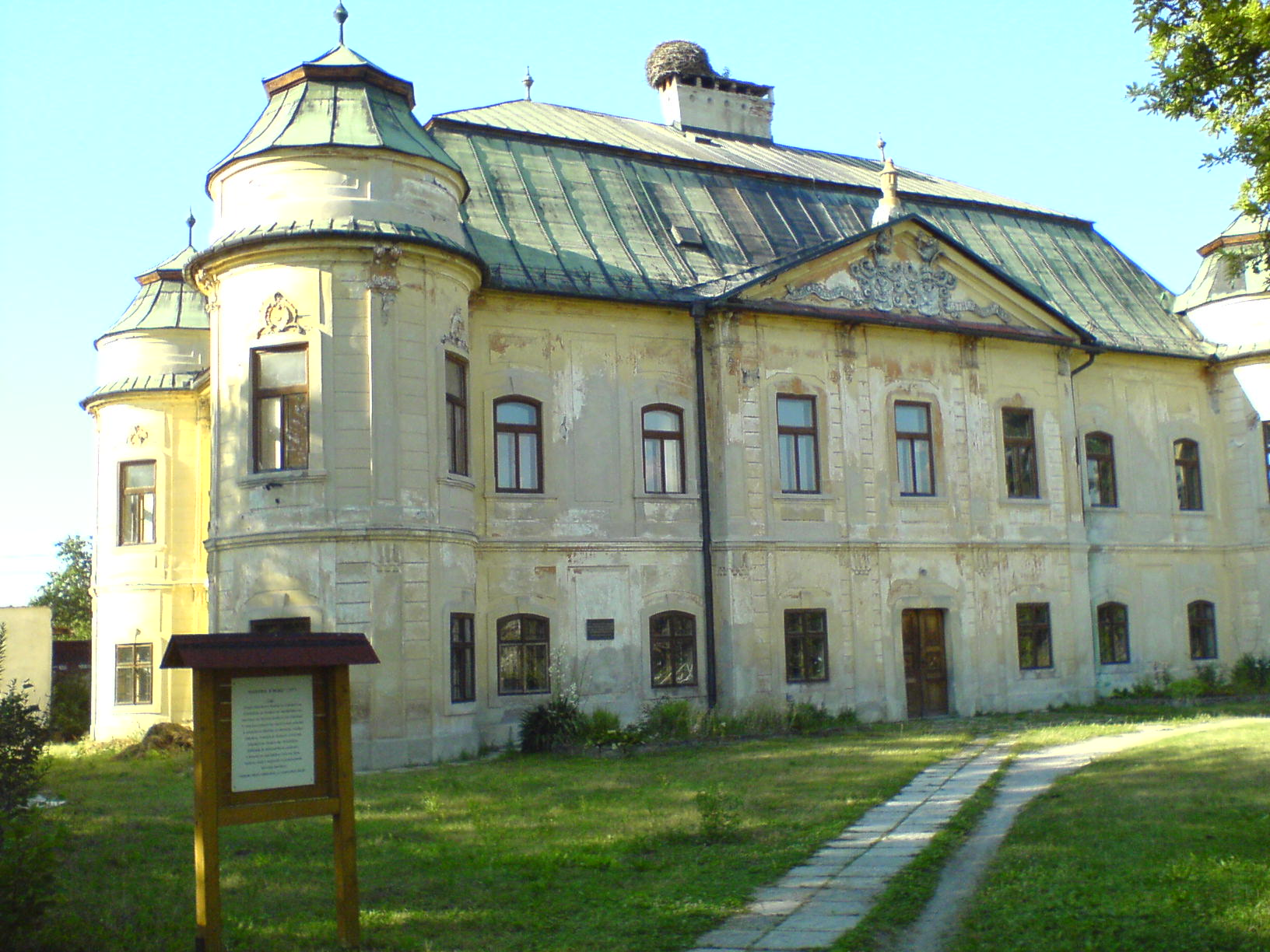 kaštieľ v Hronseku